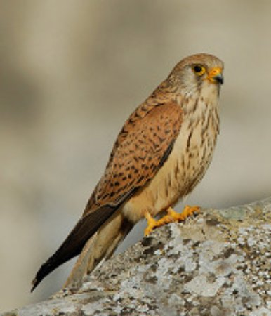 un esemplare di falco grillaio femmina a riposo